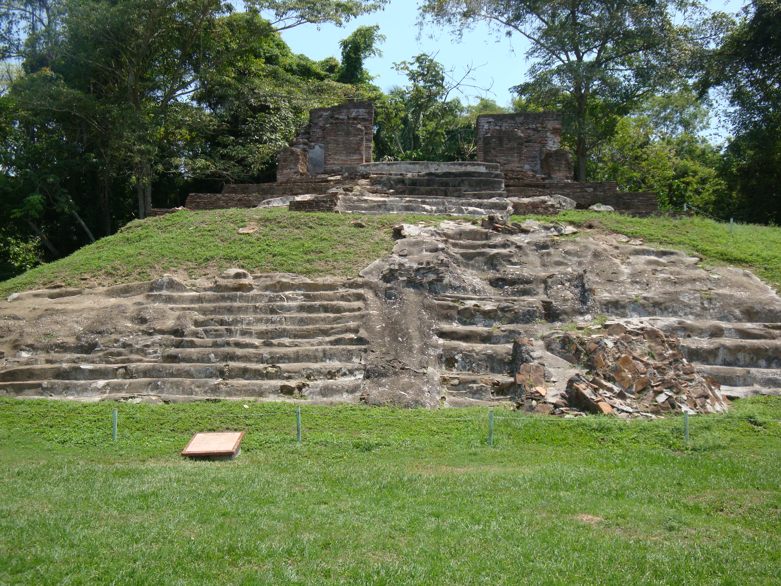 Templo II, zona arqueológica maya de Comalcalco, Tabasco, México.